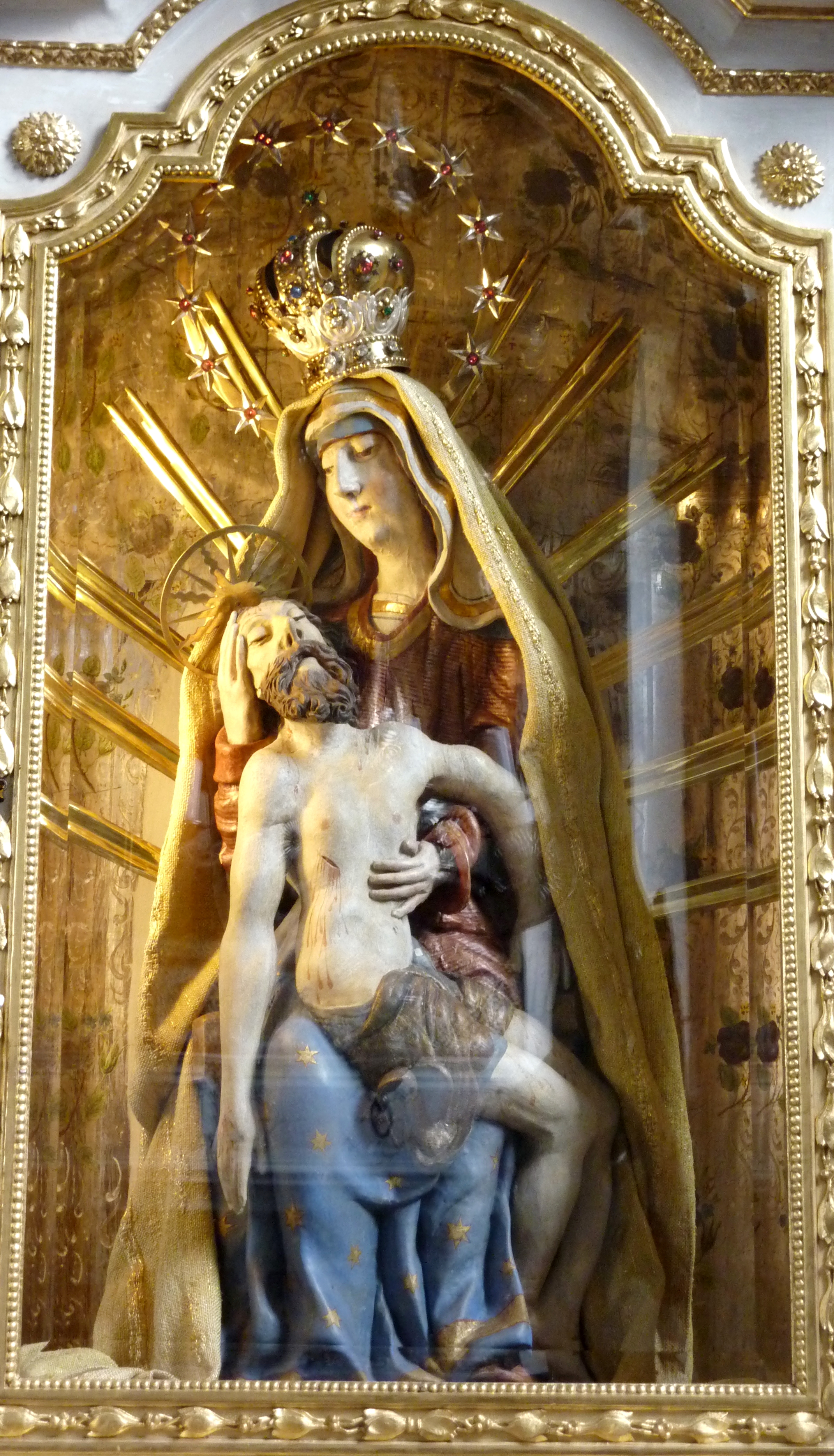 Pfarr- und Wallfahrtskirche St. Michael in Violau, einem Ortsteil von Altenmünster im Landkreis Augsburg (Bayern), Vesperbild von 1688